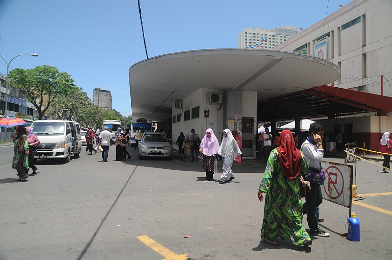 Terminal Bas Sandakan.